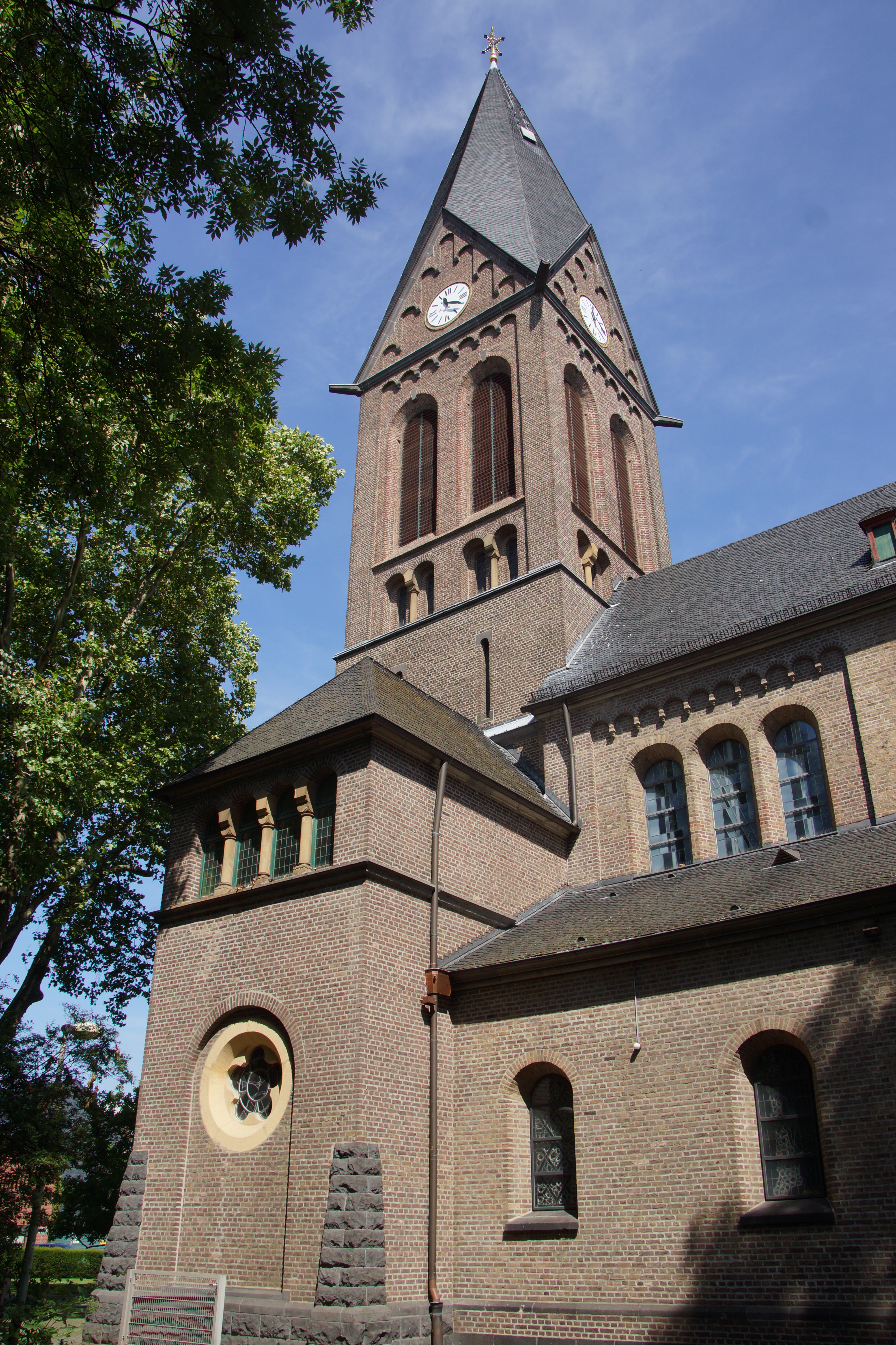 Katholische Kirche Sankt Audomar in Frechen